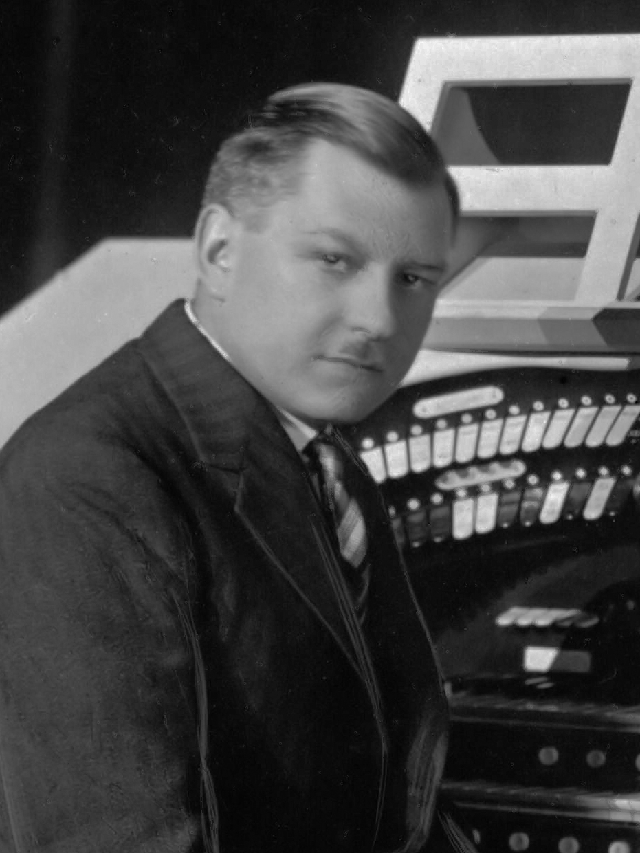 Reginald Foort, cinema-orgel bespeler 1932